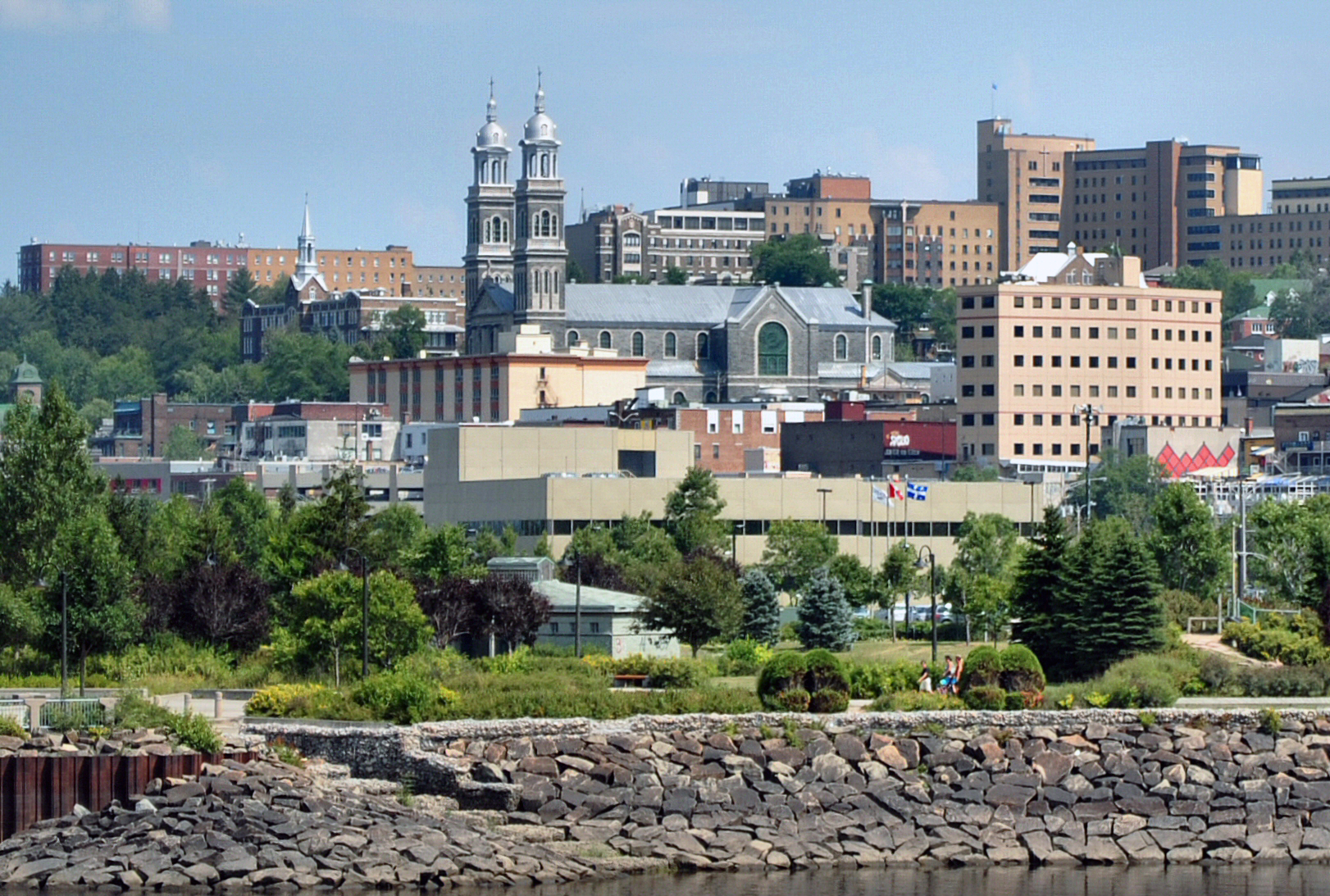 La Haute-Racine dans l'arr. Chicoutimi à Saguenay